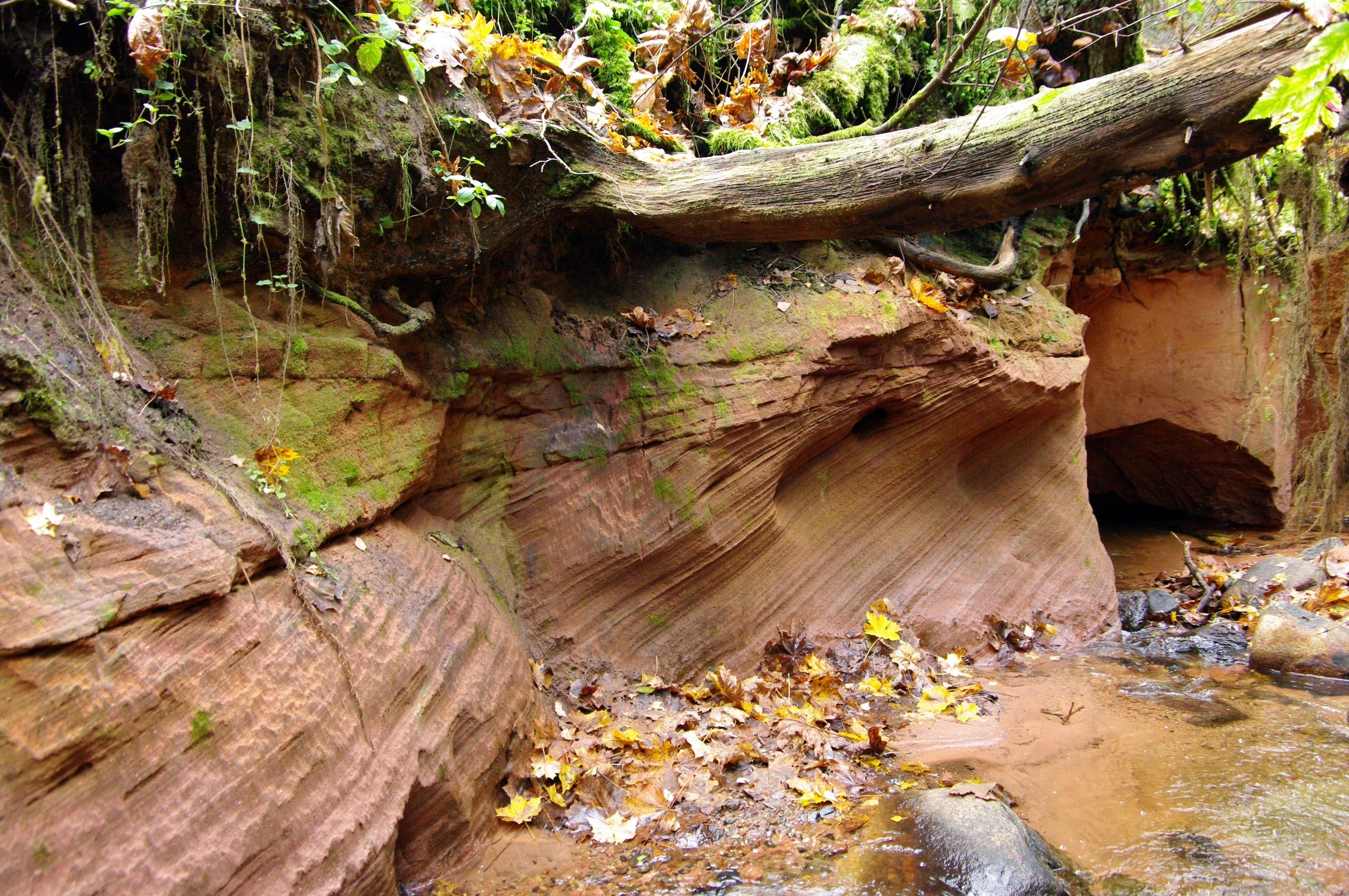 Paistu Põrguorg, Varstu oja uus voolutee, 2011 Aruküla lademe liivakivis